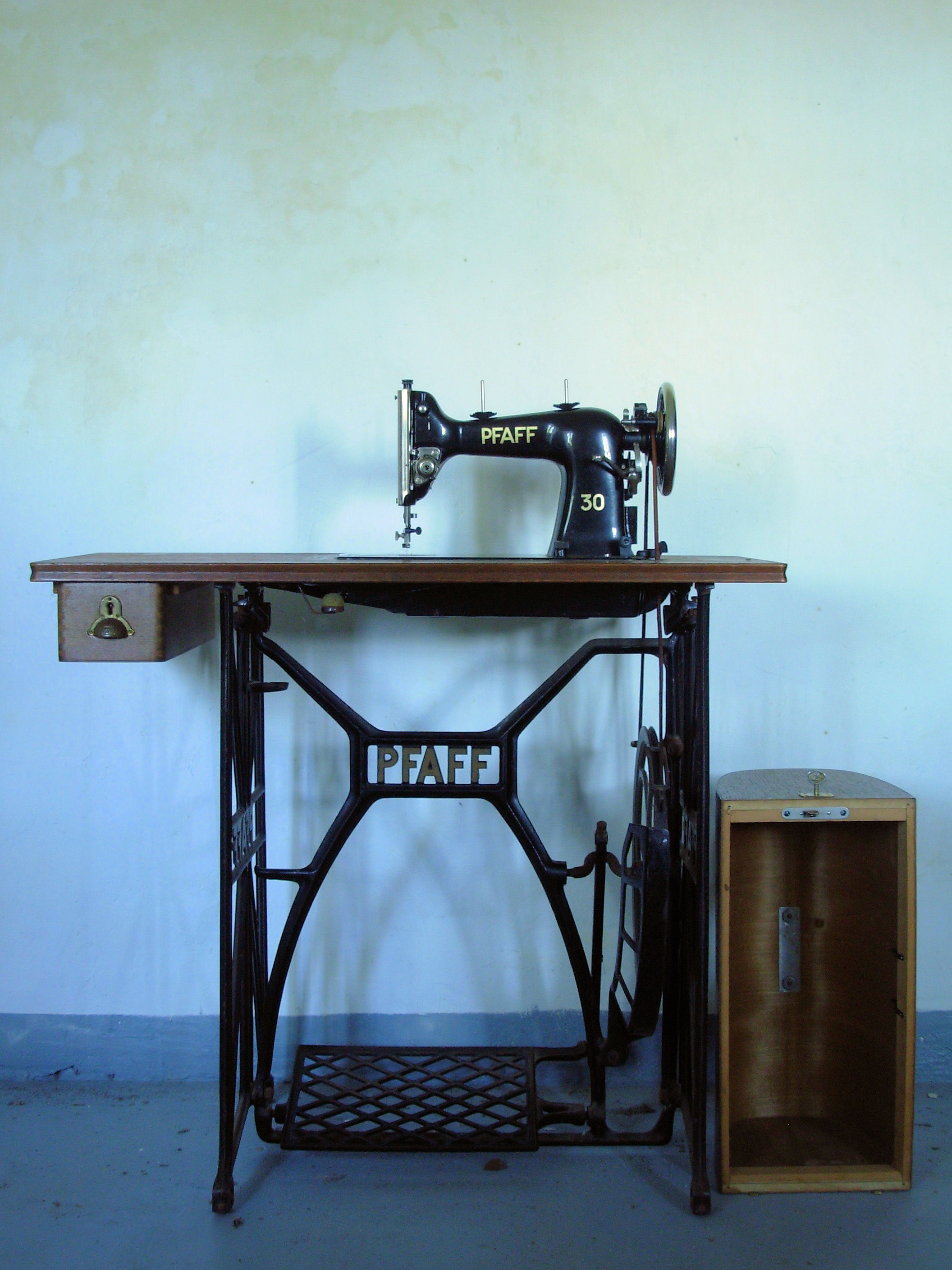 Pfaff Pedal-Nähmaschine 30er Jahre